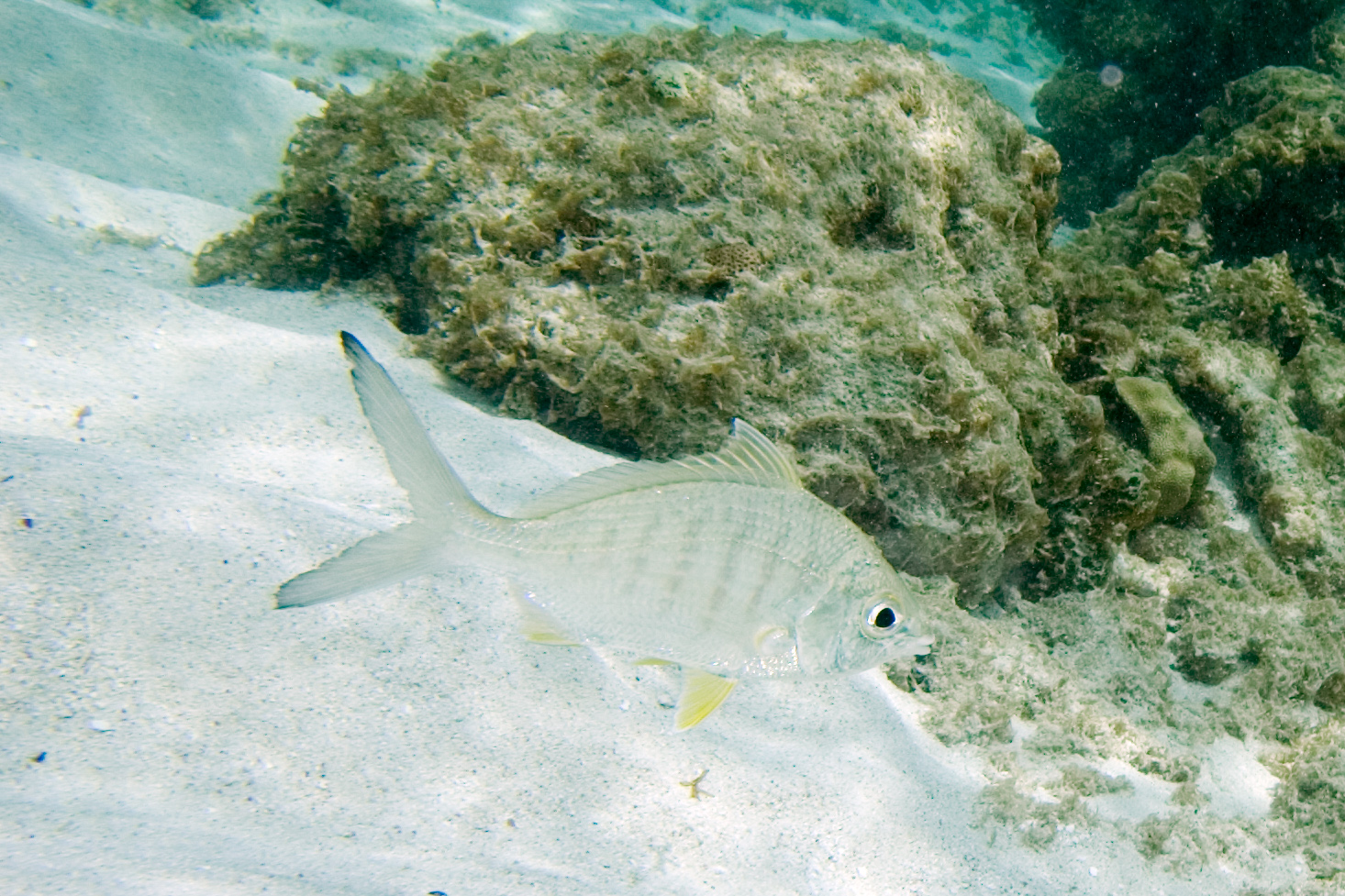 yellowfin mojarra Gerres cinereus